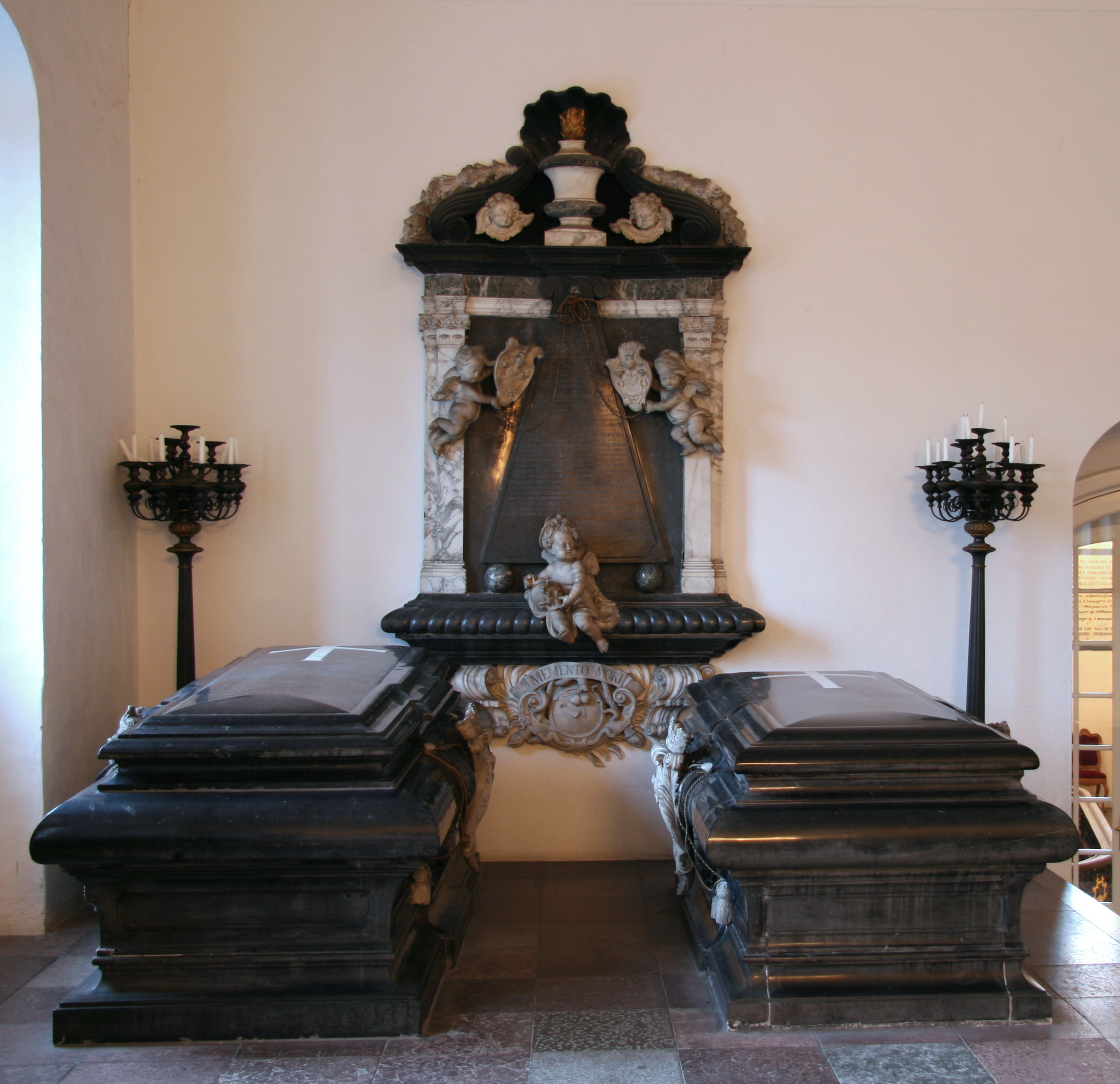 Holmens Kirke, Copenhagen, Denmark . Benzons kapel i store kapels nordende.